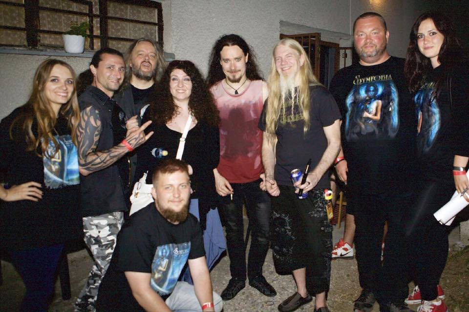 Symfobia so skupinou Nightwish